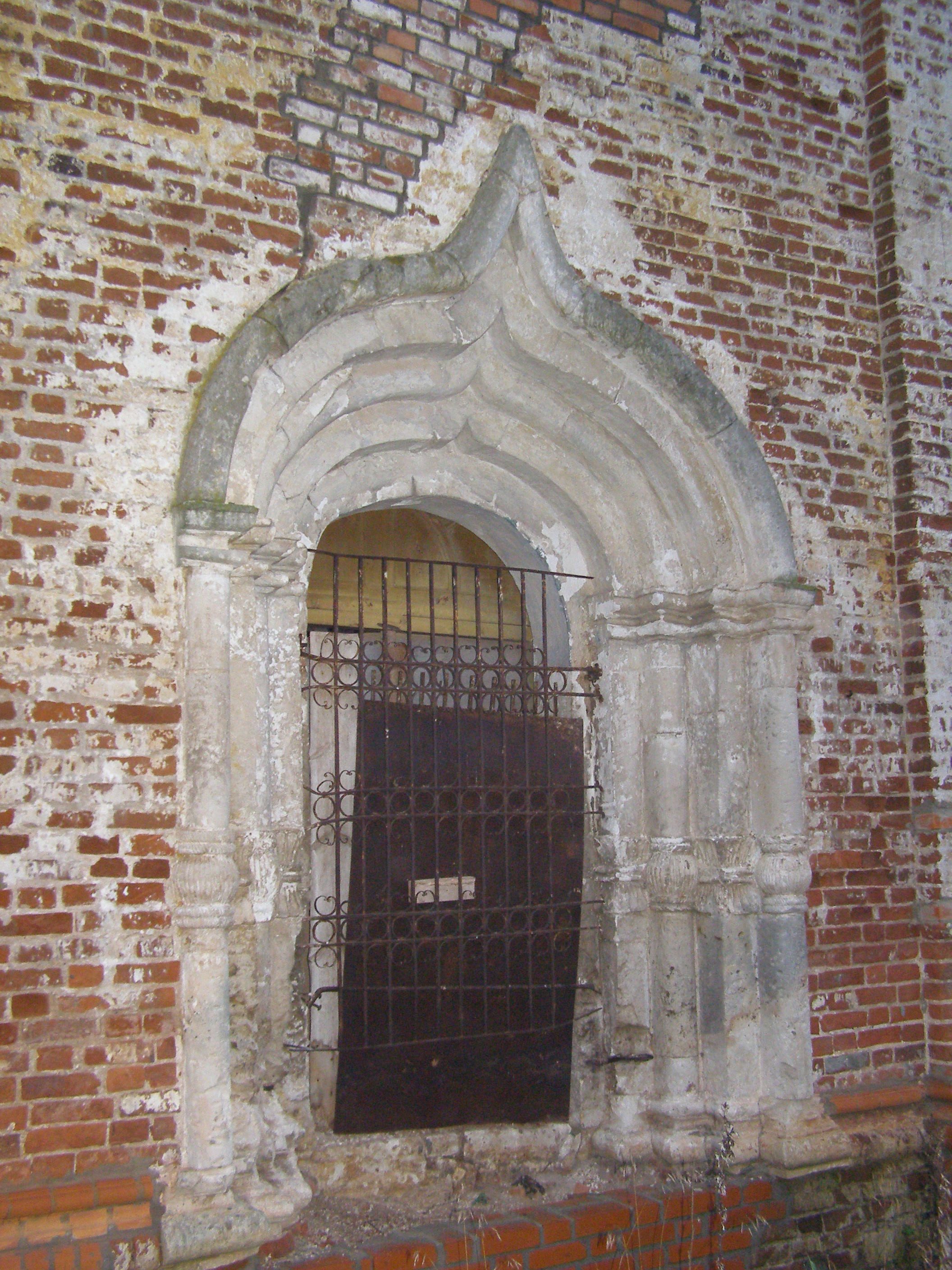 Собор Рождества Пресвятой Богородицы: Пустынь, Дмитровский район, Московская область